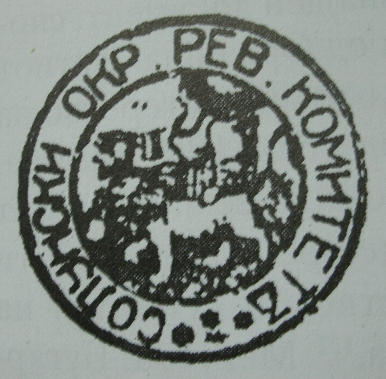 Печат на Солунския революционен окръг на ВМОРО.